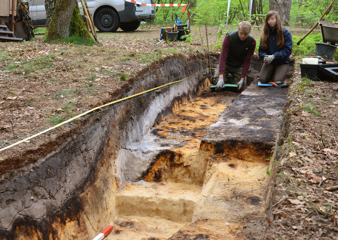 Ausgrabung im früheren Lagerareal des Römerlagers Bielefeld